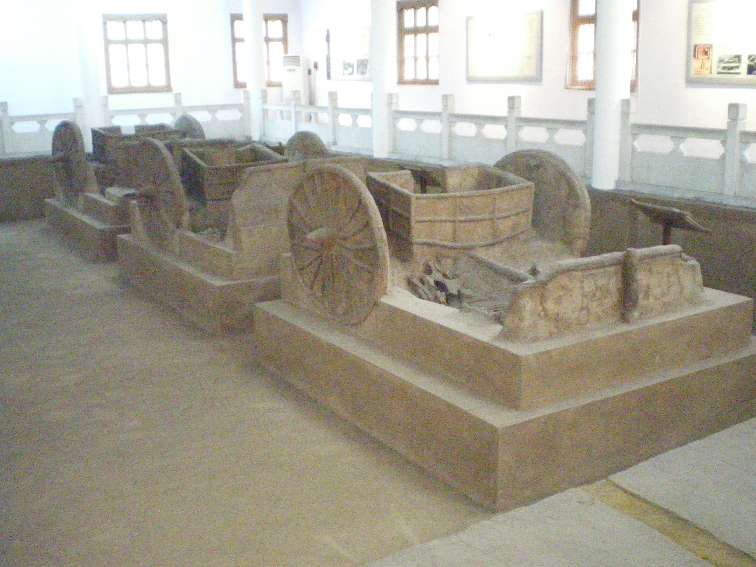 Yinxu | 殷墟